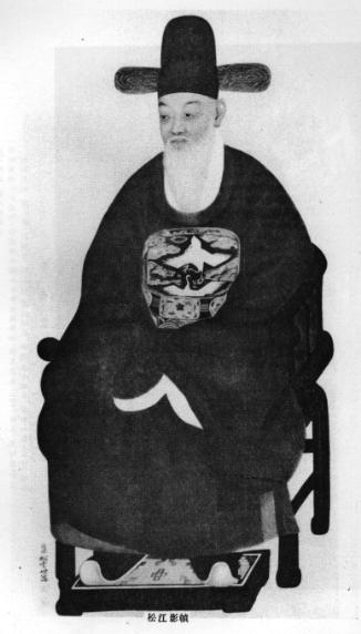 정철, 한국어 시인